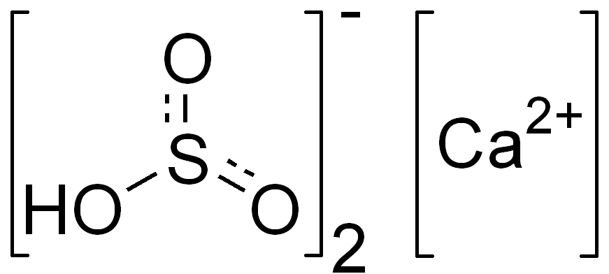 chemical structure of calcium bisulfite (bisulphite)